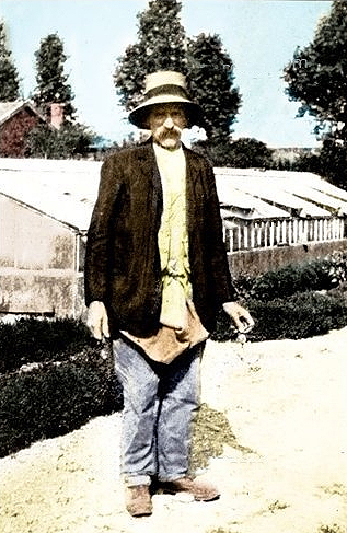 Джозеф Перне-Дюше